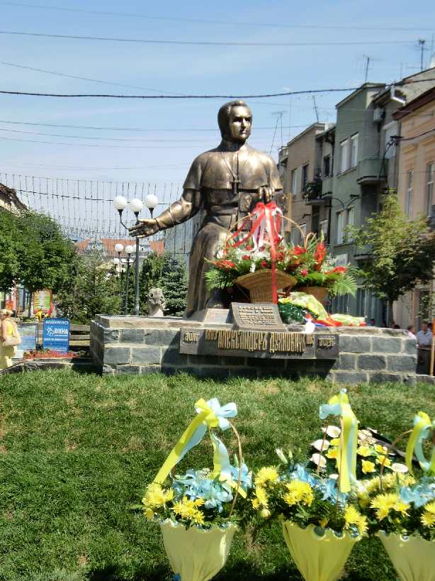 Пам'ятник А.Духновичу в Мукачеві Oleksandr Dukhnovych monument in Mukachevo